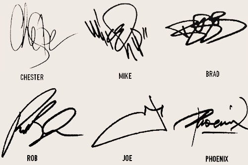 Assinatura dos integrantes da banda Linkin Park